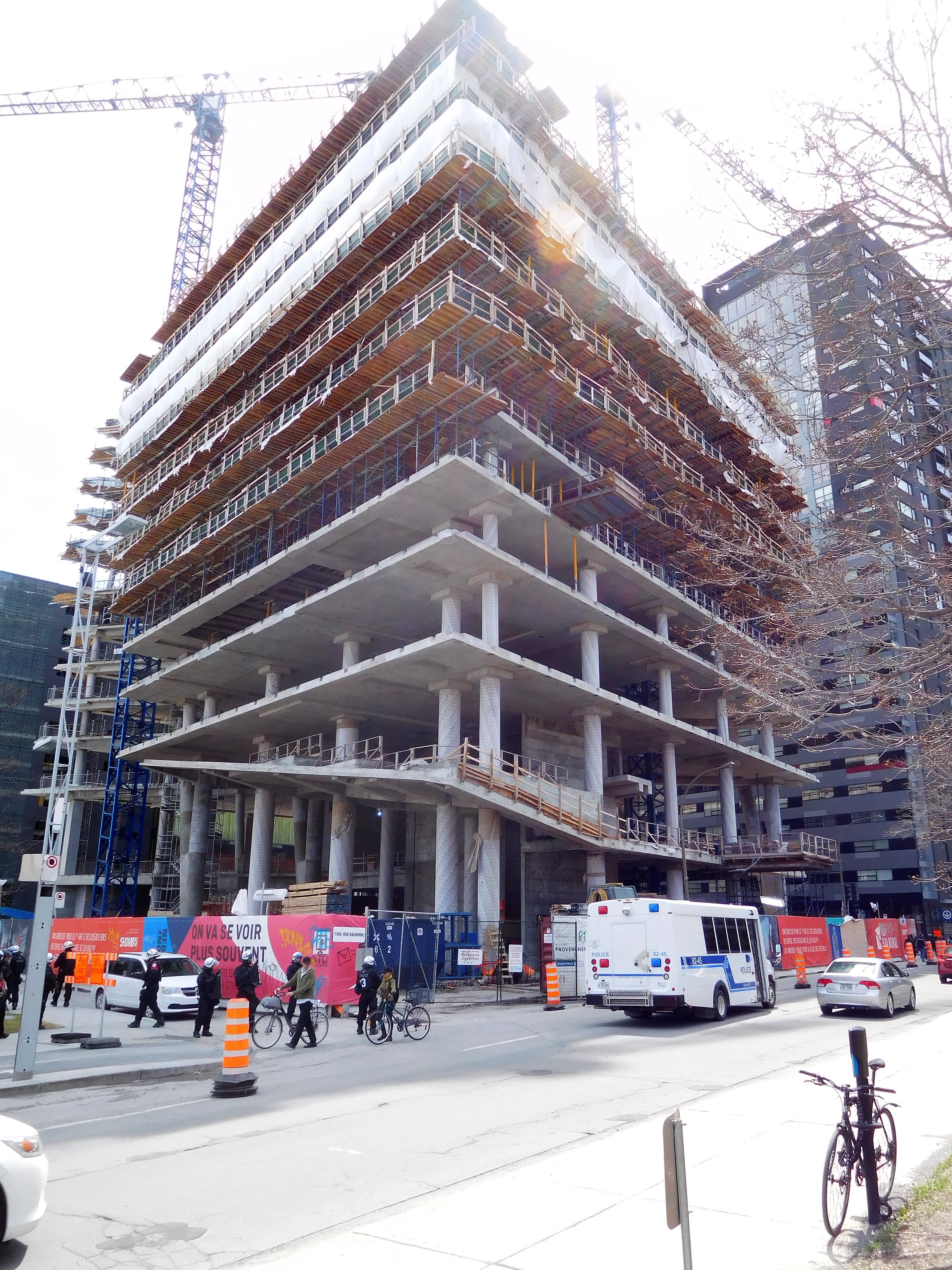 Îlot Balmoral (comprenant la Maison de l'ONF), délimité par le boulevard Maisonneuve et les rues De Bleury, Mayor et Balmoral, à Montréal